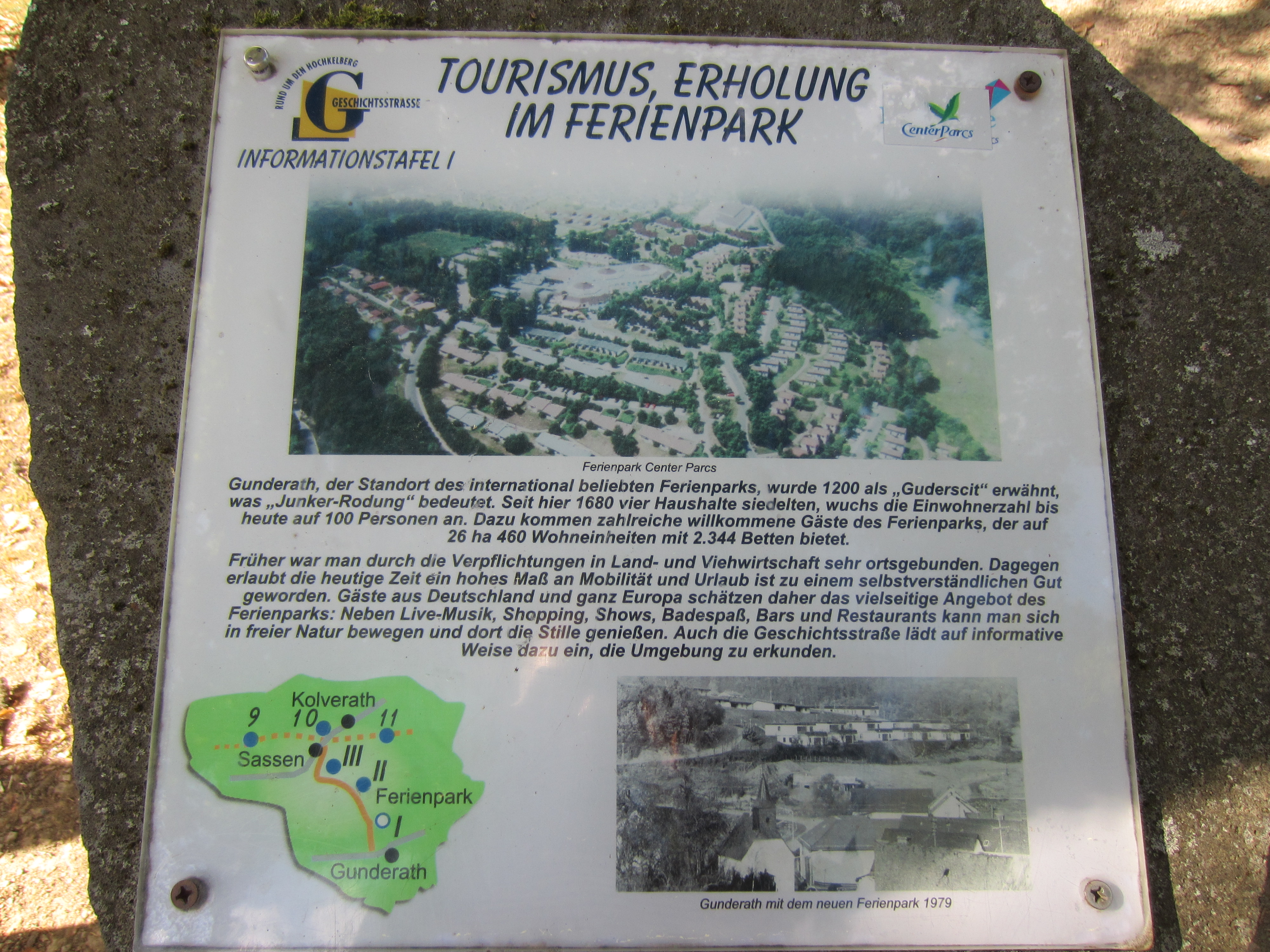 Bordje met oude foto